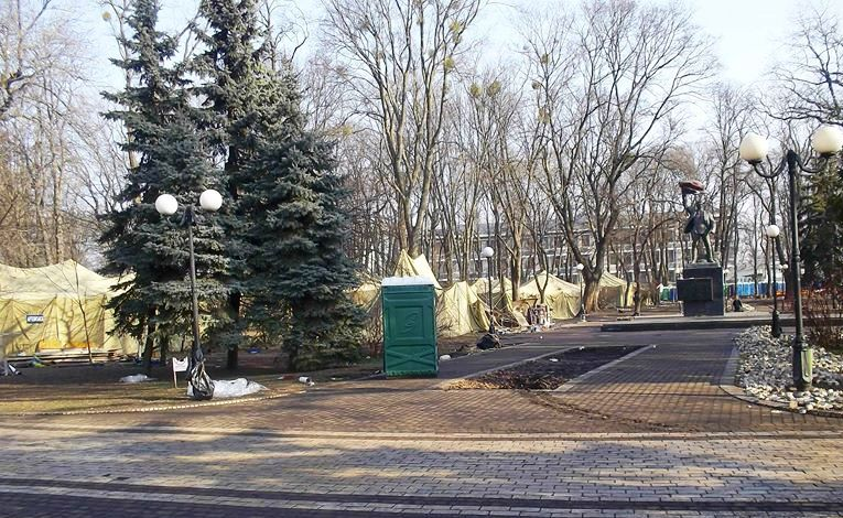 20.02.14. Маріїнський Парк. Табіт"тітушок".